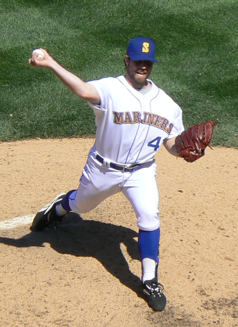 R. A. Dickey